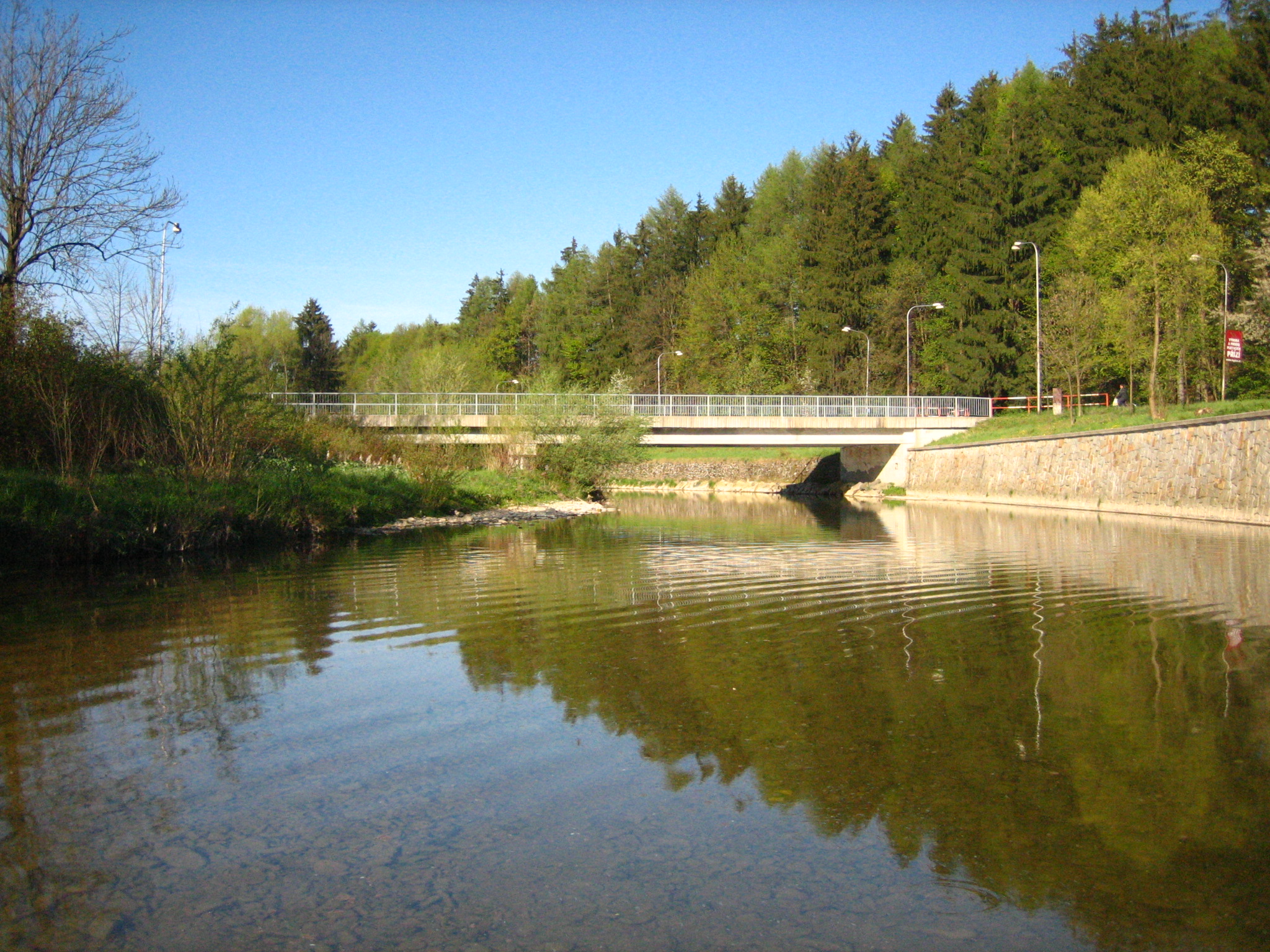 Pláň nad jezem v Halenkově pod lušovským mostem